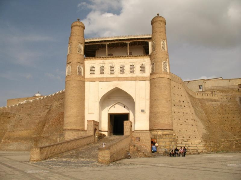 IMG_0300 Bukhara, Uzbekistan